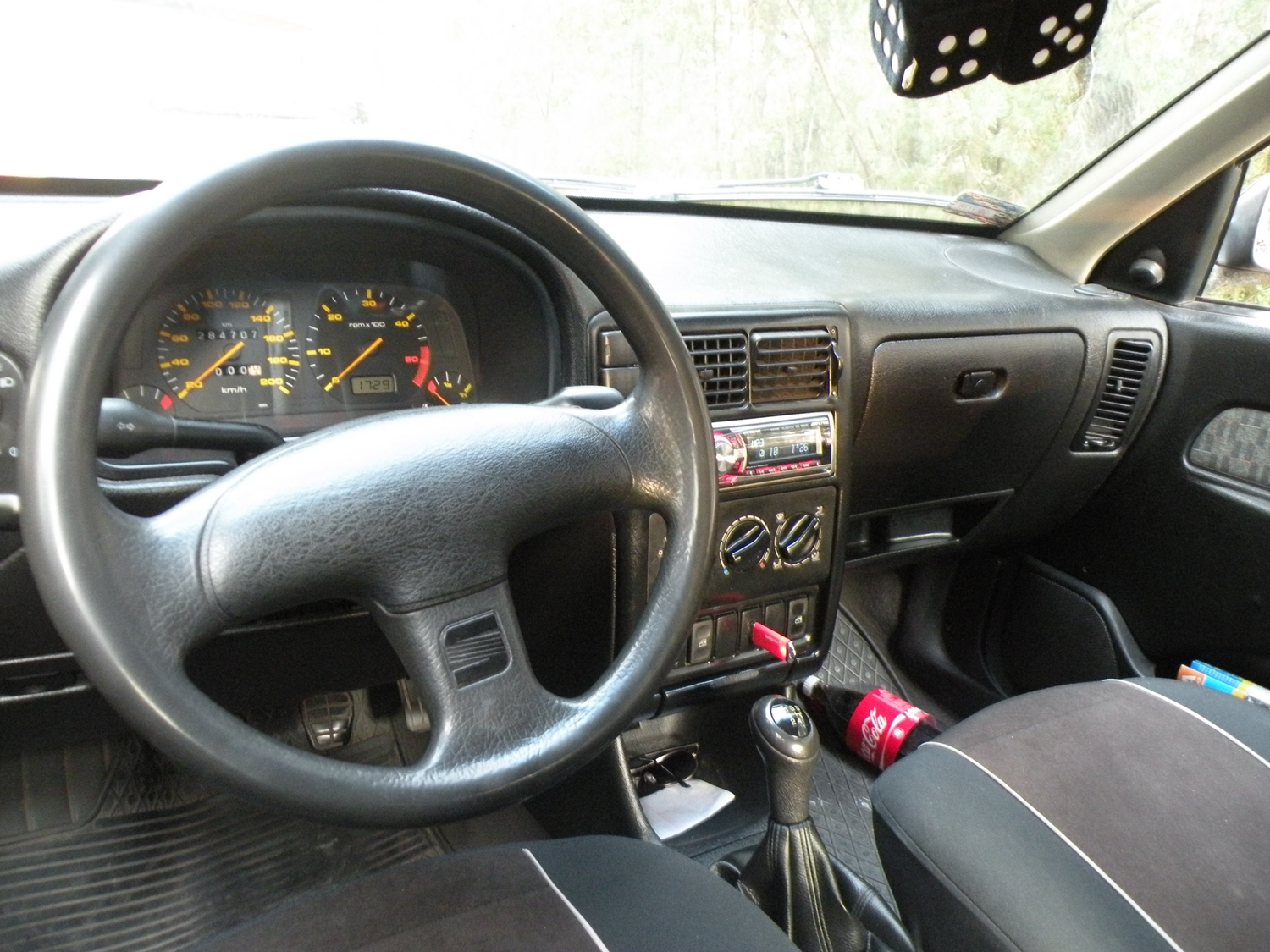 SEAT Ibiza Mk2 pre-fl interior